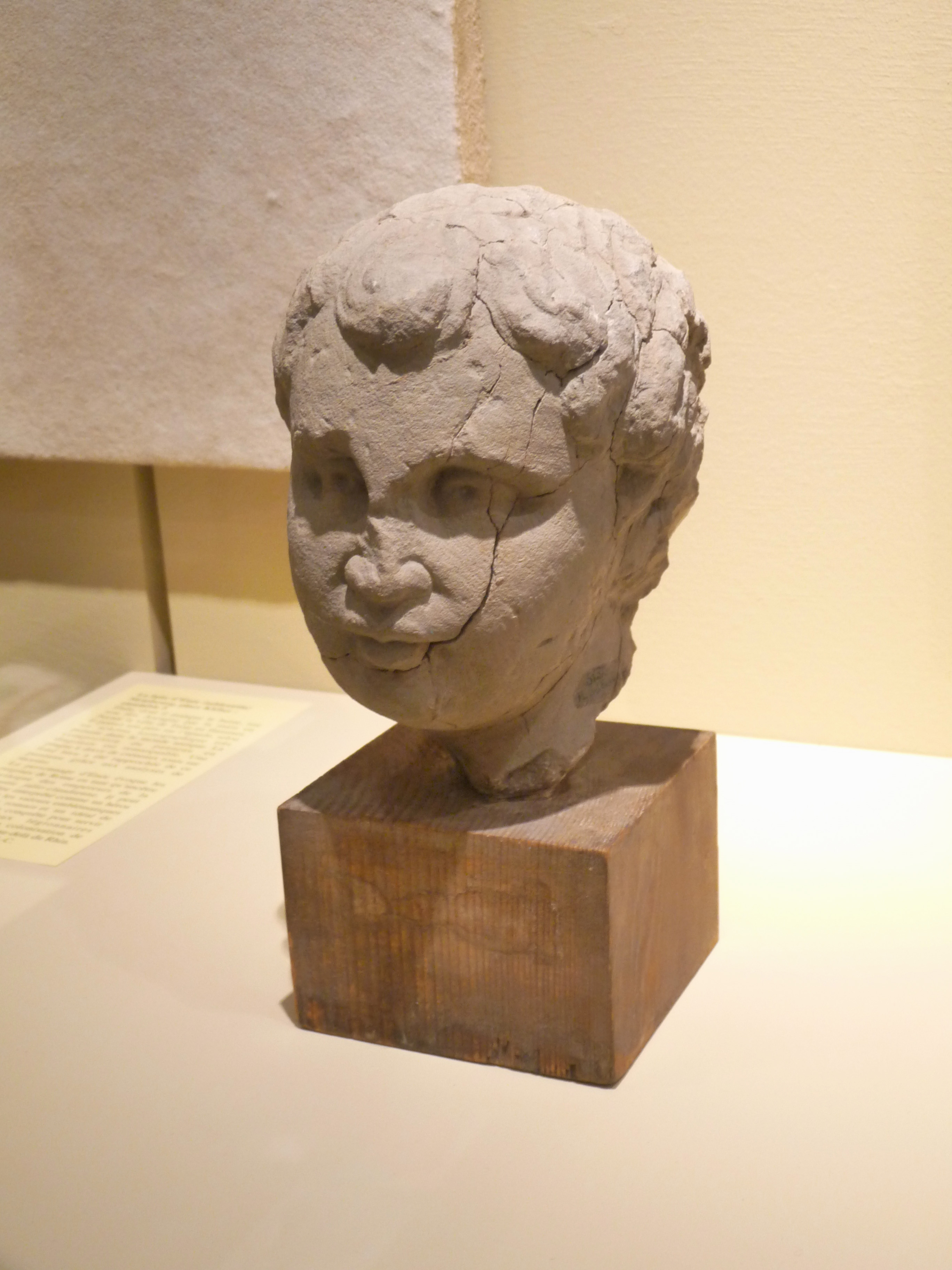 Tête attribuée à Caracalla jeune, début du 3e s. après JC. Trouvée à Strasbourg, place Gutenberg. Musée archéologique de Strasbourg